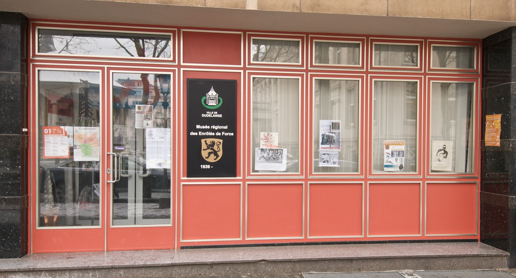 Den Zwangsrekrutéiertemusée zu Diddeleng